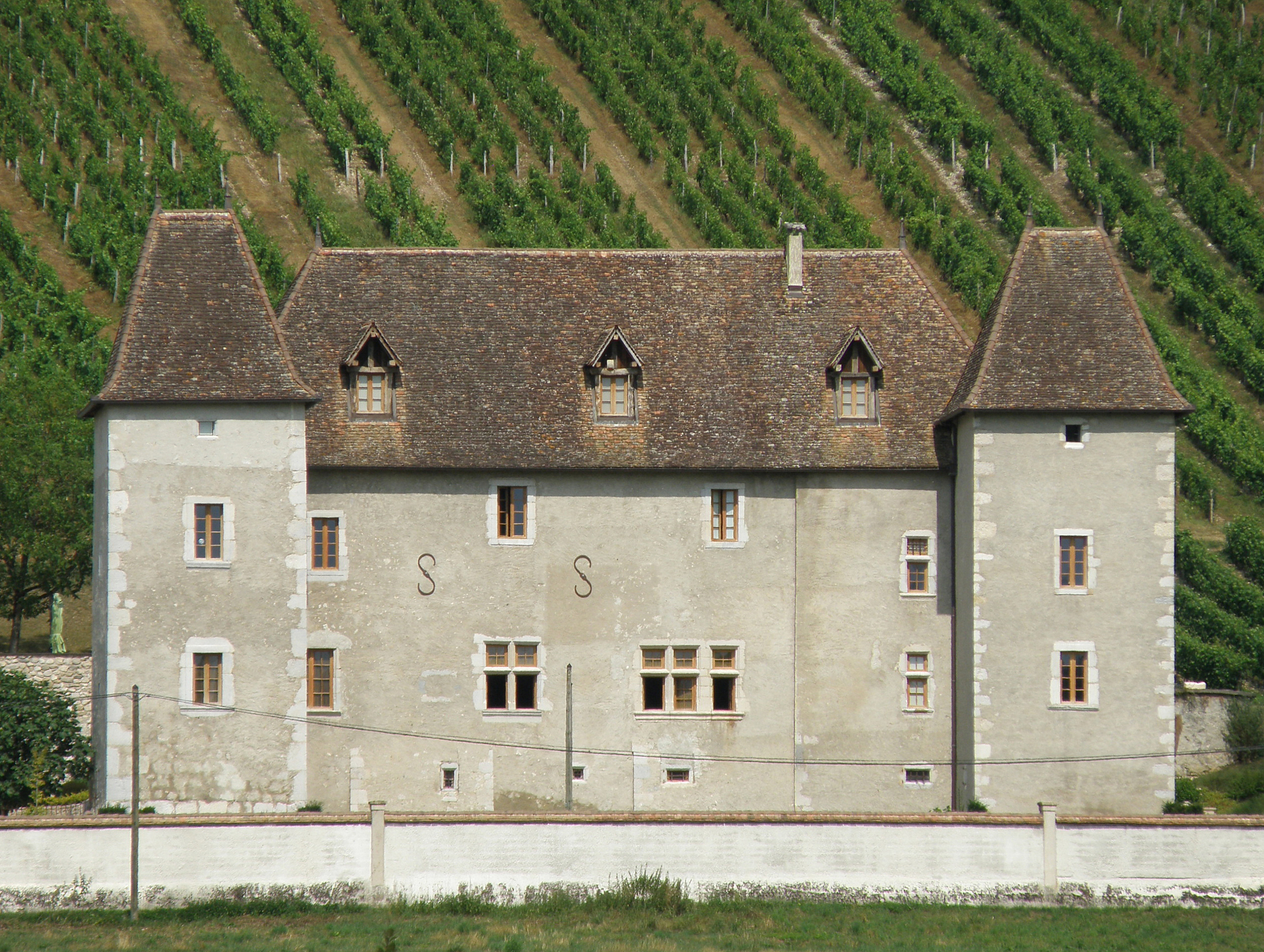 Jongieux, comm. du département de la Savoie (région Rhône-Alpes, France). Château de La Mar.